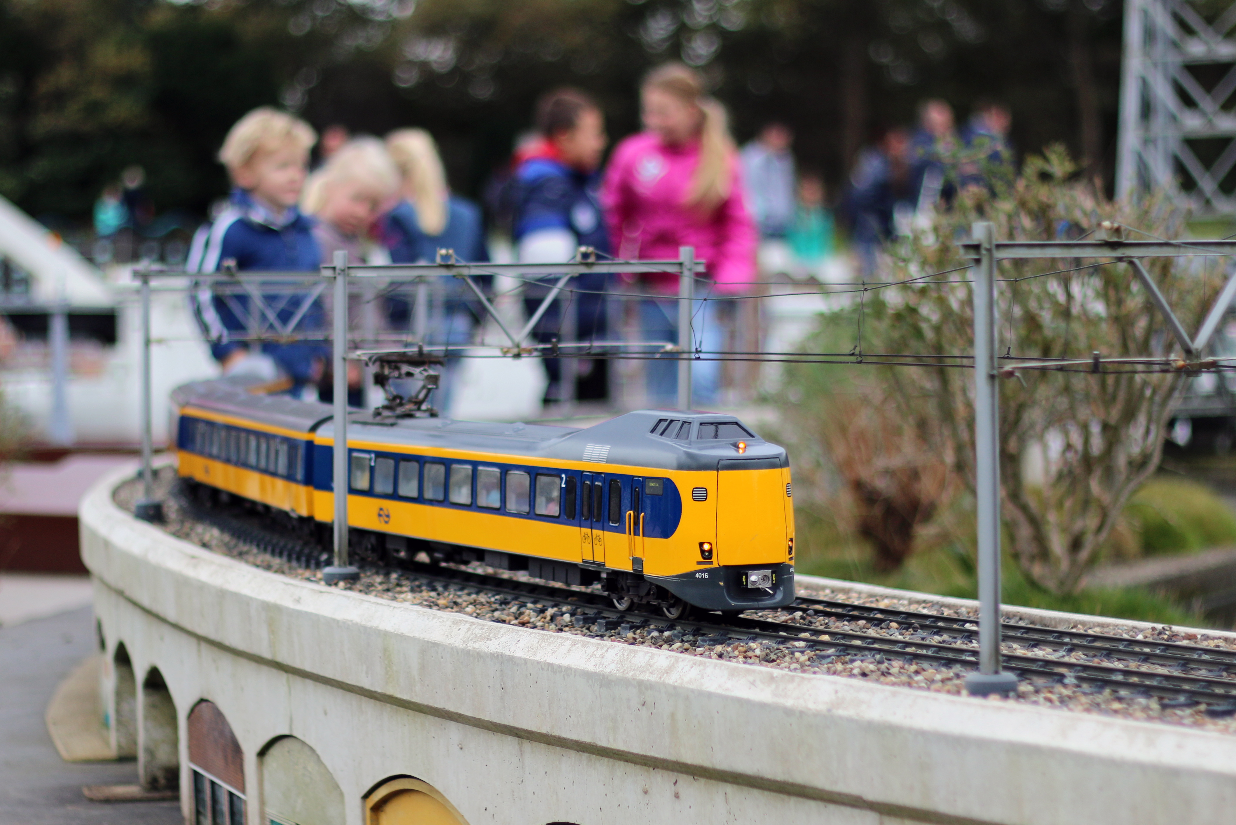 Een nieuwe trein in Madurodam, een gemoderniseerde ICM4 met het nummer 4016 (wat in werkelijkheid een ICM3 is, detail). Wel leuk om te zien dat er (helaas tijdelijk) meer treinen rondrijden. 23 oktober 2014.